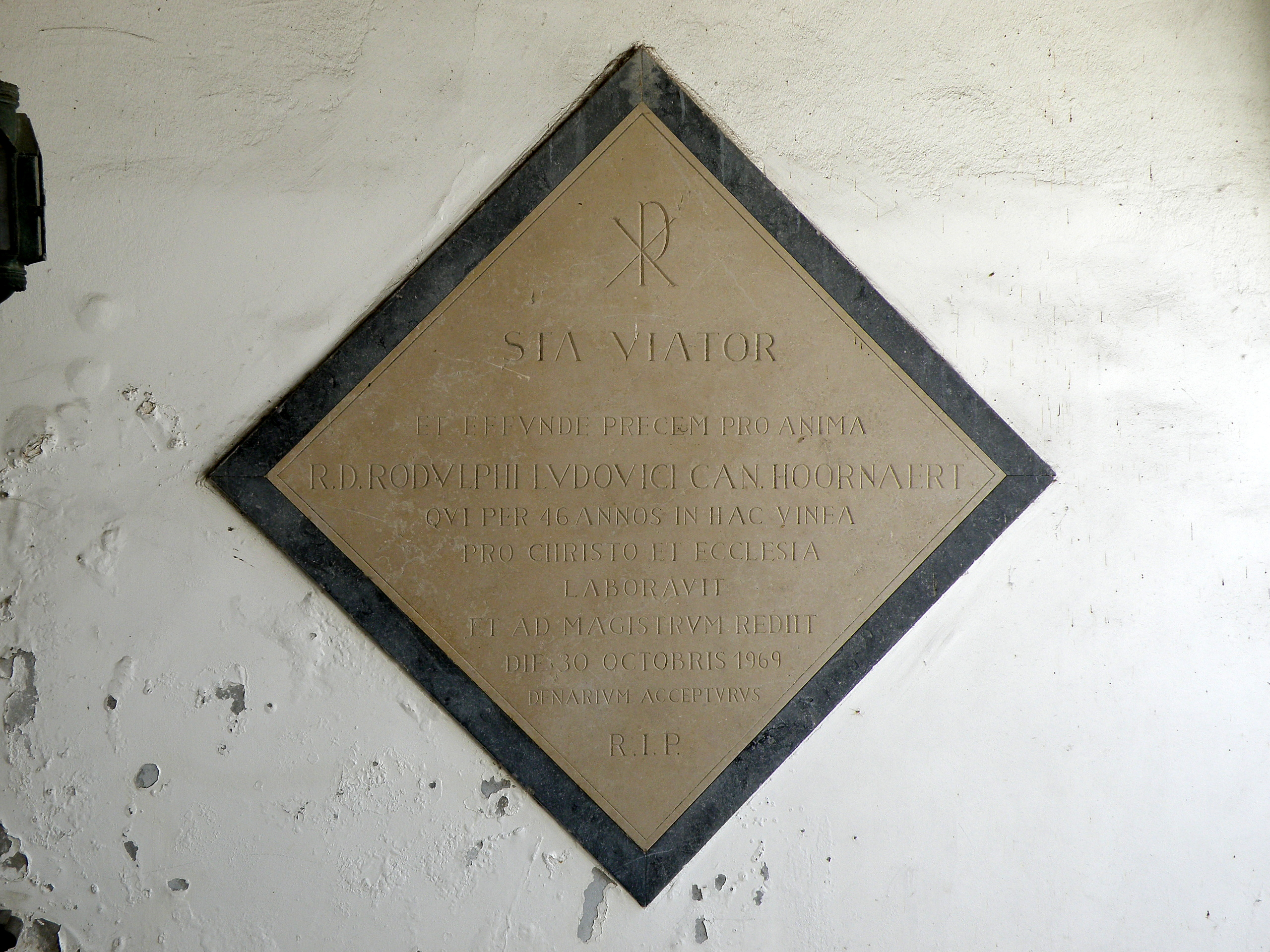 Brugge, Begijnhof. Gedenkplaat Rodolphe Hoornaert in het ingangsgebouw van het begijnhof.